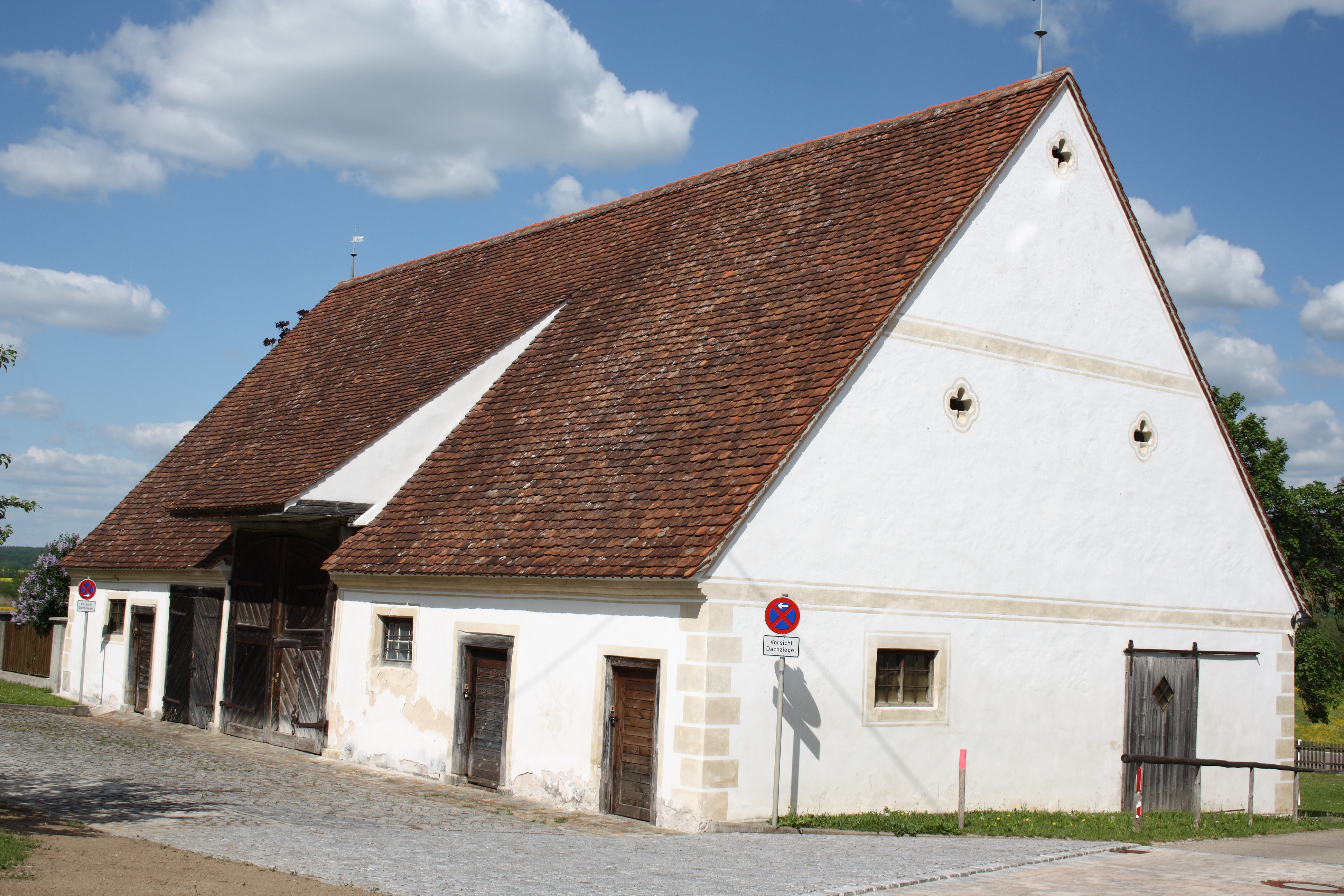 Pfarrstadel in Wörnitzstein, erbaut 1758, 1783 vergrößert, Graf-Hartmann-Straße 31